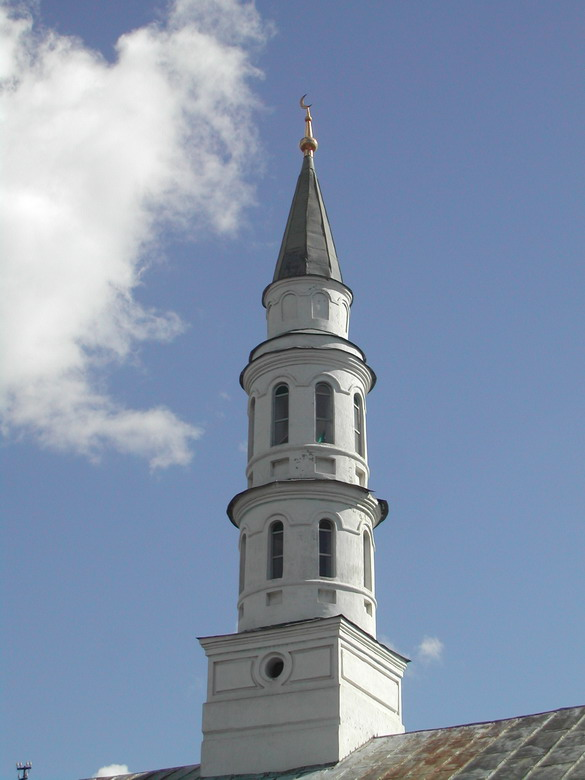 Минарет мечети Иске-Таш, г. Казань, Татарстан, Россия